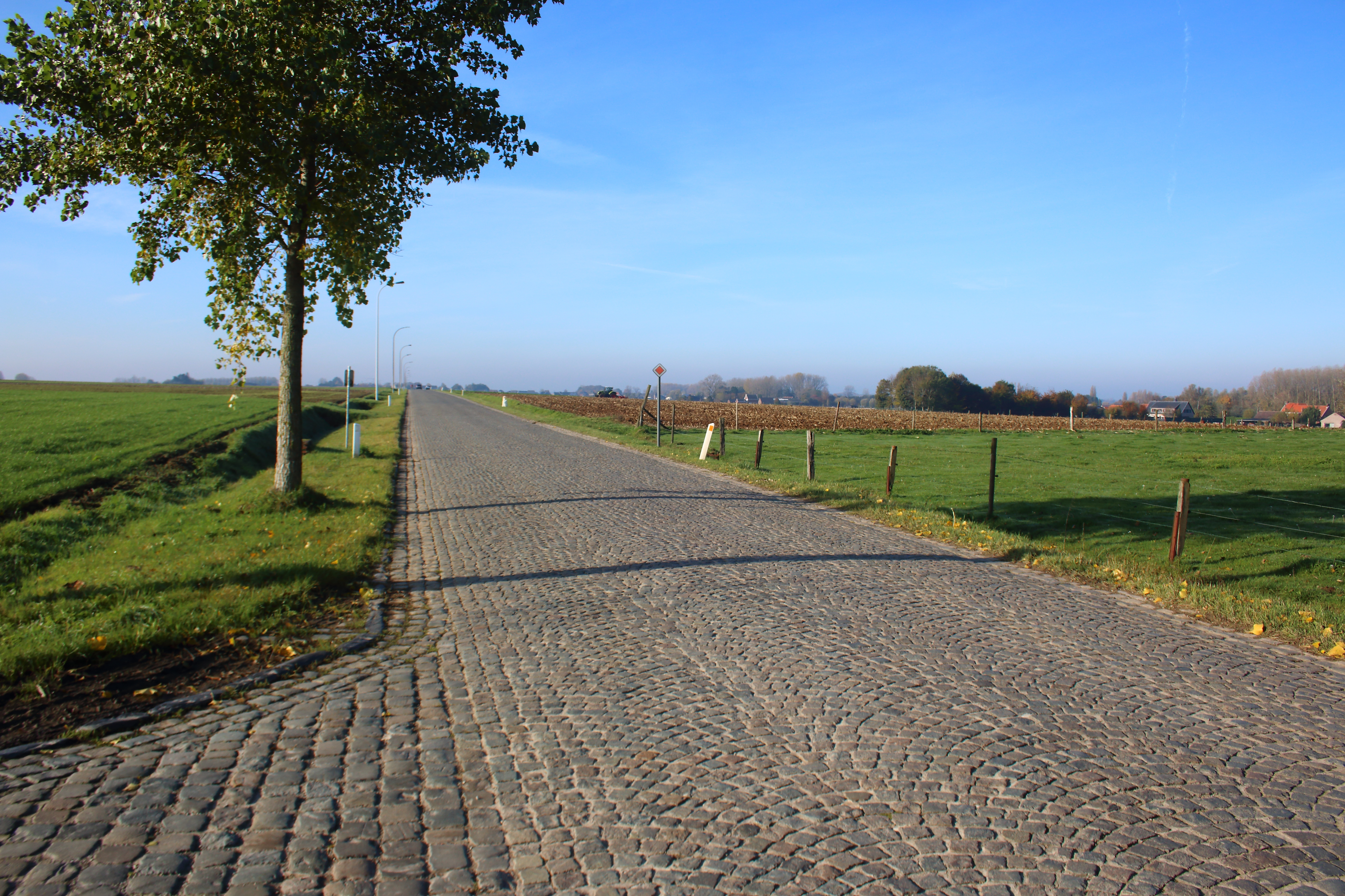 Lange Munte, Scheldewindeke, Oosterzele, Vlaanderen, België